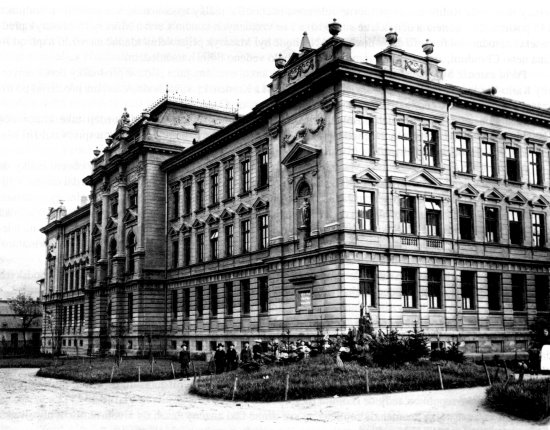 Budova gymnázia vyfocená krátce po dokončení